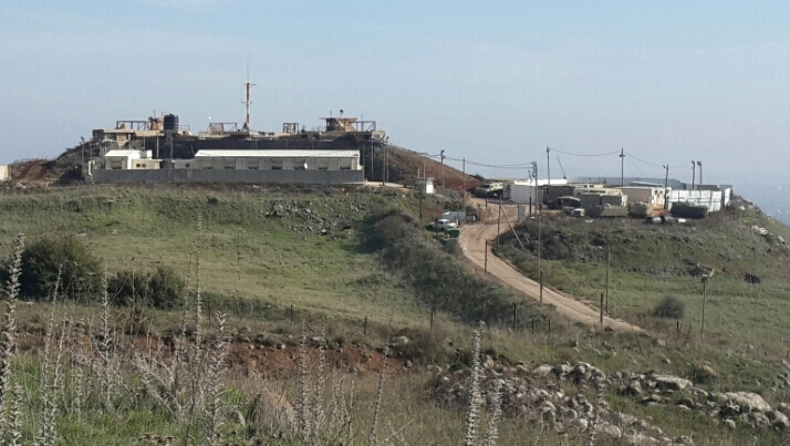 מוצב 105 ברמת הגולן משמש כבית חולים לפצועים ממלחמת האזרחים בסוריה 2014